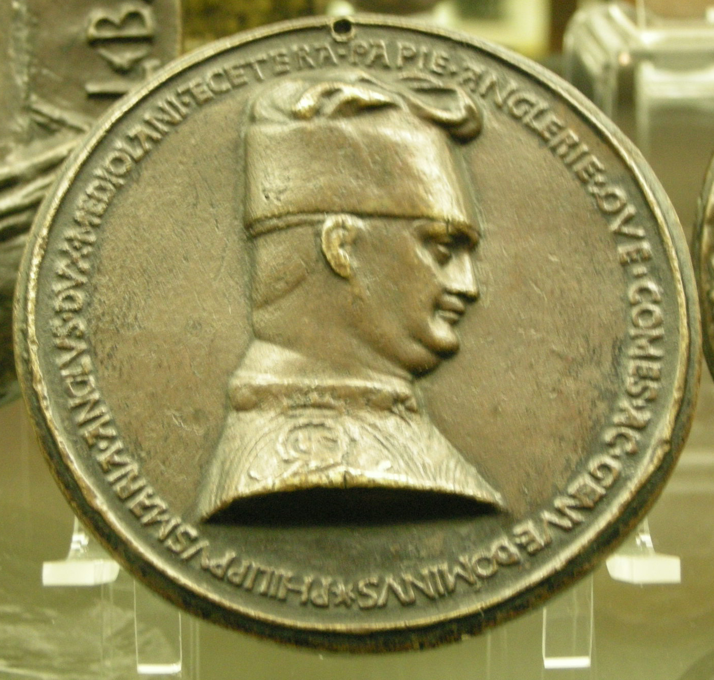 Recto della medaglia con ritratto di Filippo Maria Visconti (1392-1447), Duca di Milano.